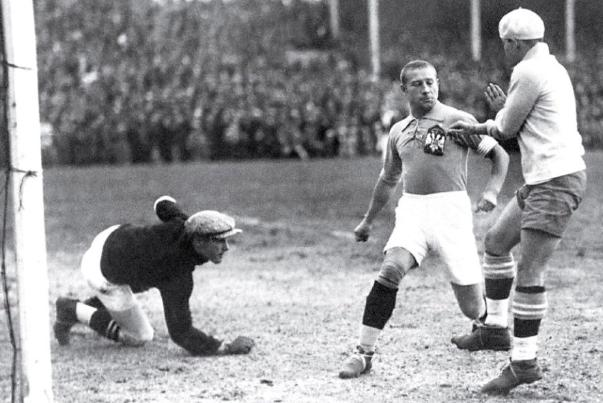 Yugoslavia x Brasil en Uruguay 1930. Los jugadores son Jakšić, Mihajlović y Theóphilo.